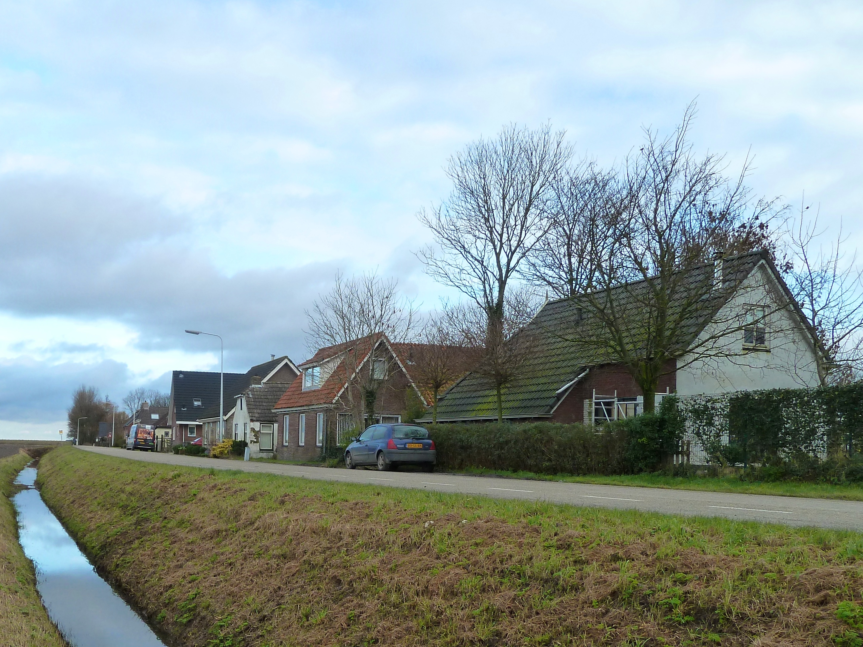 Het buurtschap Krabburen in de Friese gemeente Kollumerland en Nieuwkruisland, gezien vanaf de richting Warfstermolen.